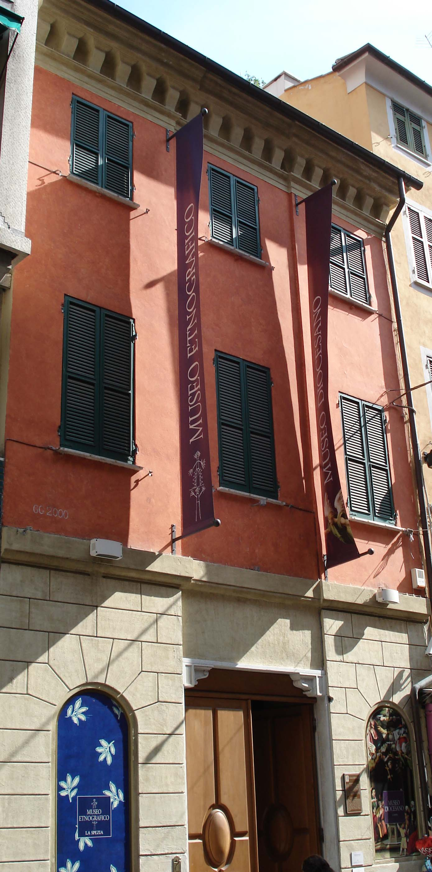 Museo Etnografico e Museo Diocesano - La Spezia - Italia.